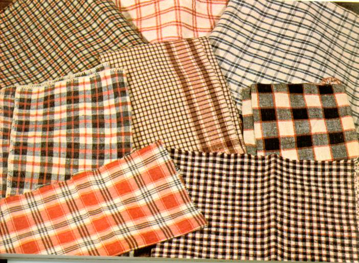 Tissu Verquelure de Montbéliard (Musée)